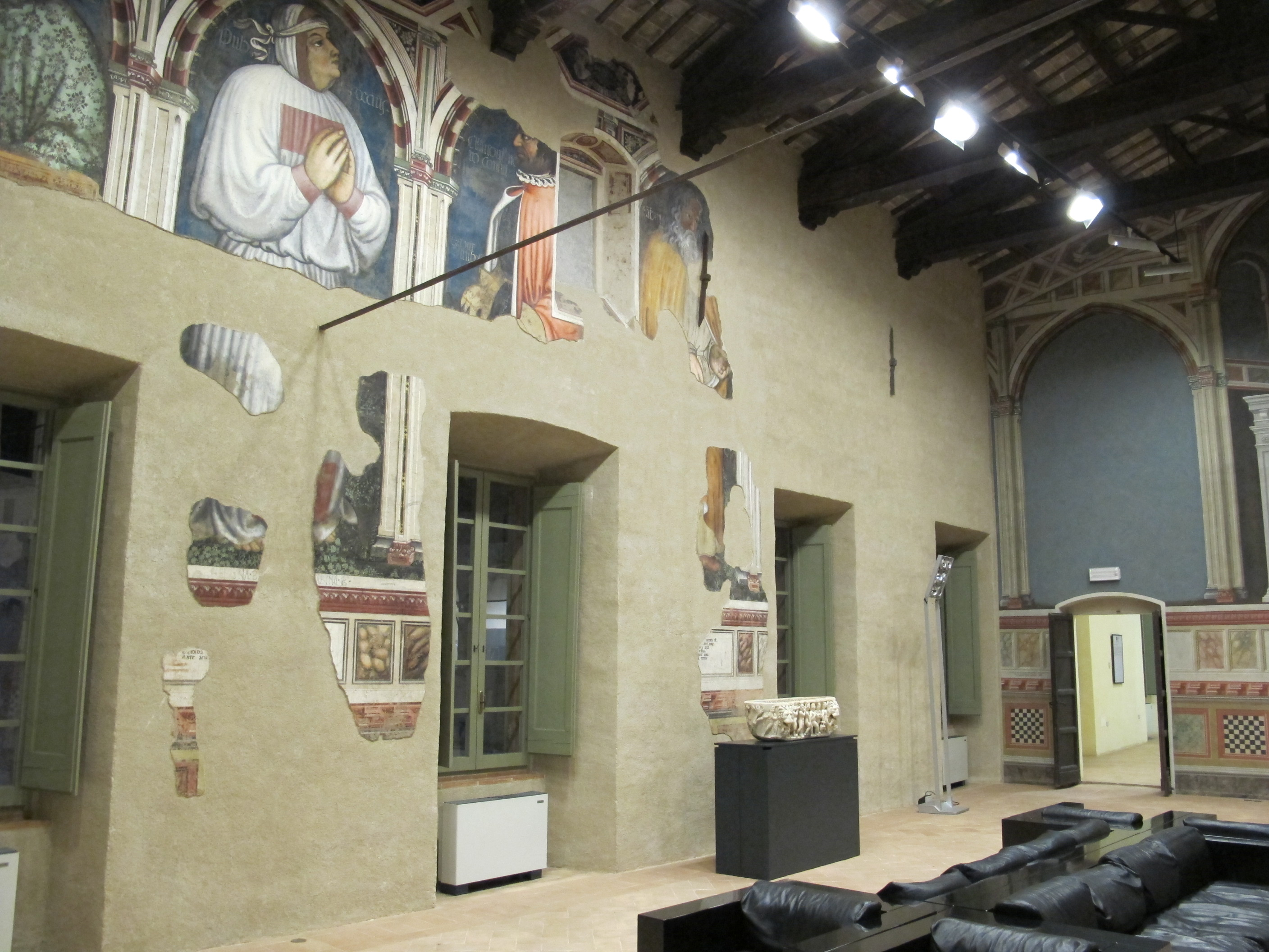 Palazo trinci, sala dei giganti (o degli imperatori)